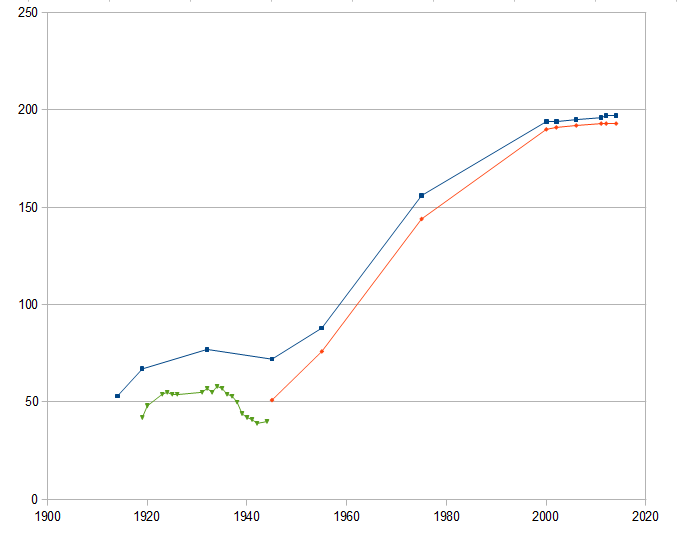 Toutes les valeurs sont au 31 décembre de chaque année. Bleu : nombre d'États reconnus (reconnus par l'ONU à partir de 1945) Orange : nombre de membres de l'Organisation des Nations unies (ONU) Vert : nombre de membres de la Société des Nations (SdN)